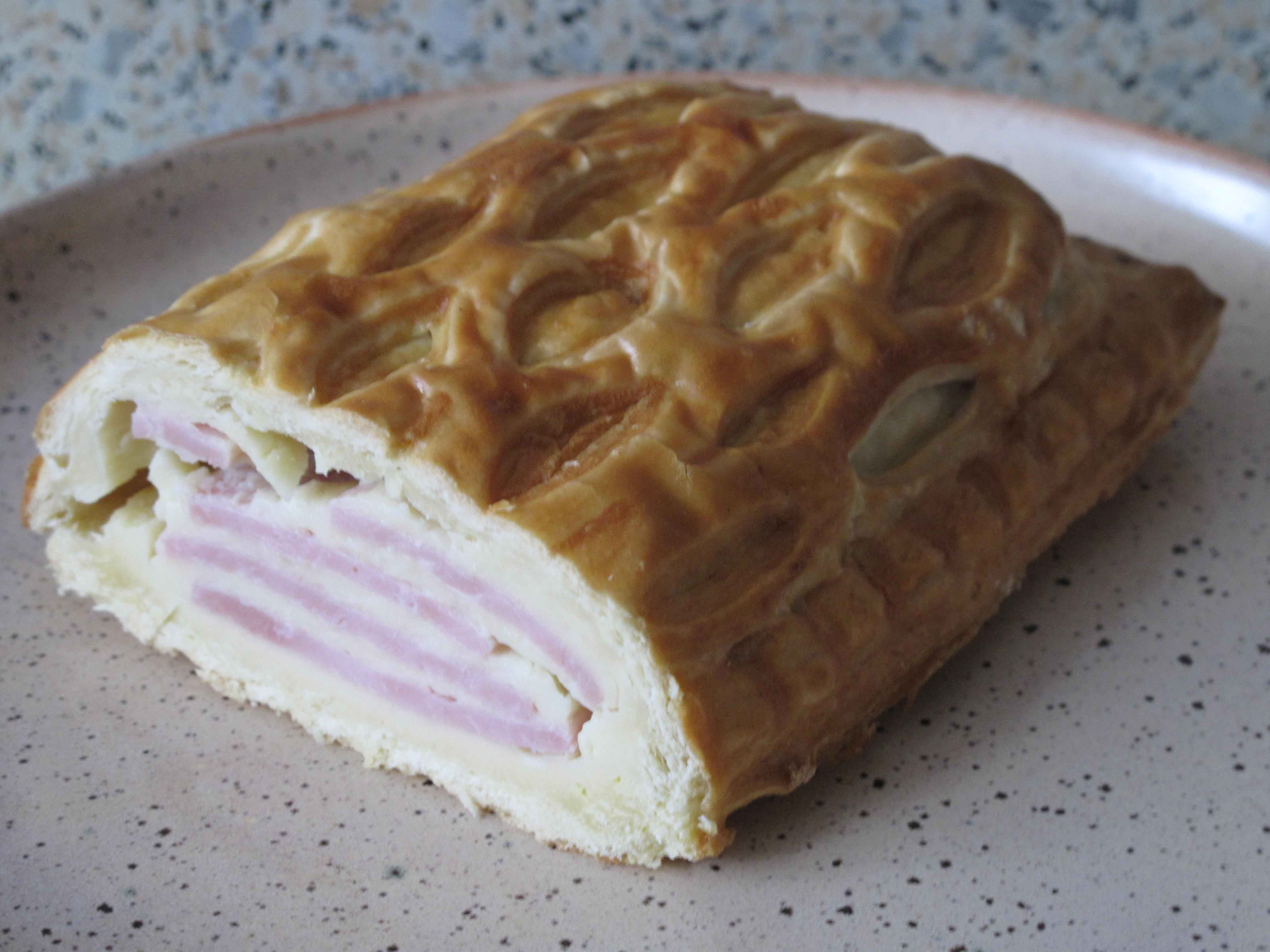 Feuillantine franc-comtoise, ou feuilleté comtois. Plat salé à base de couches intercalées de fromage et de jambon dans de la pate feuilletée